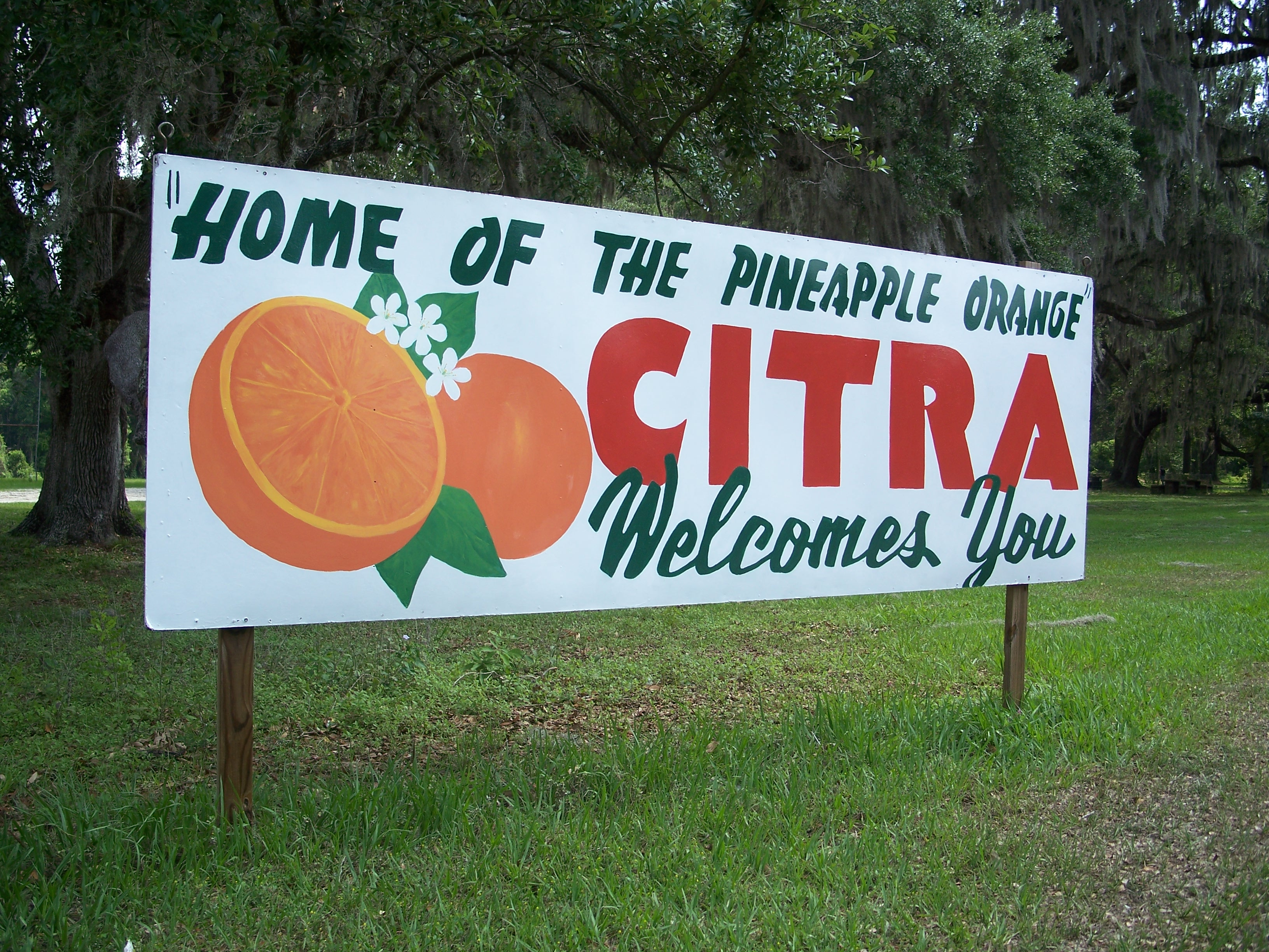 Welcome sign to Citra, Florida